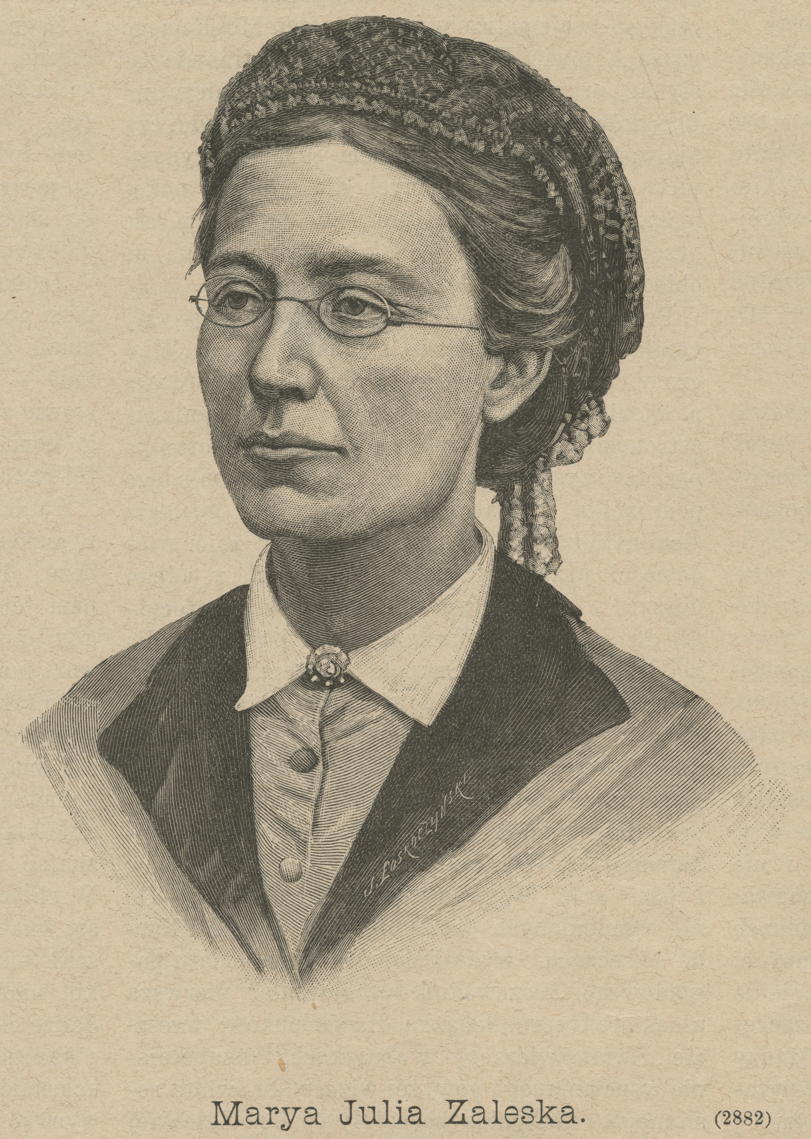 Marya Julia Zaleska